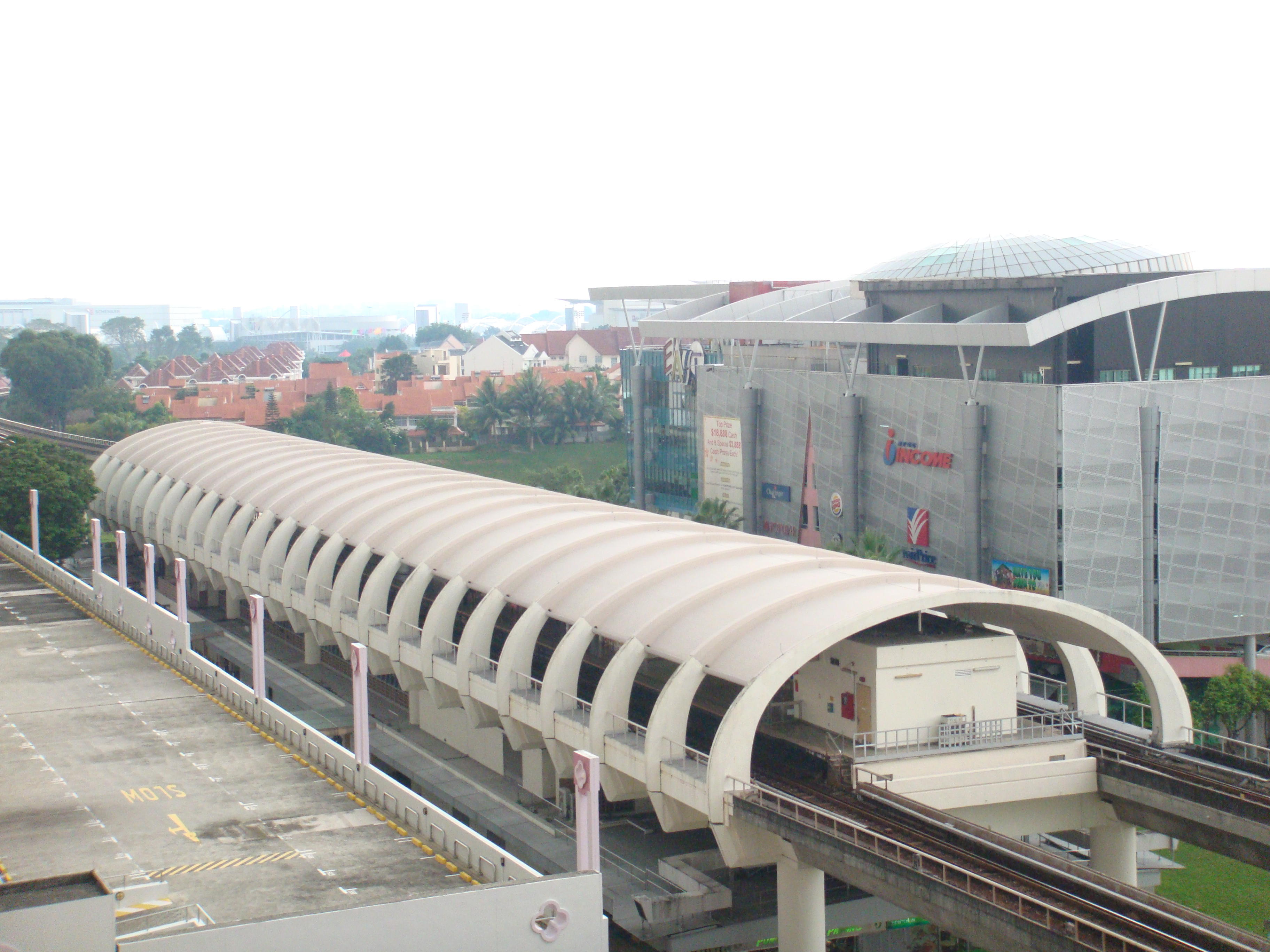 Simei MRT Station, Simei, Singapore.